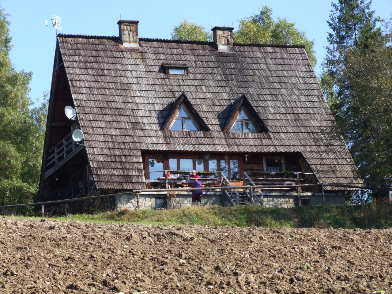 Bacówka na Maciejowej (Gorce)